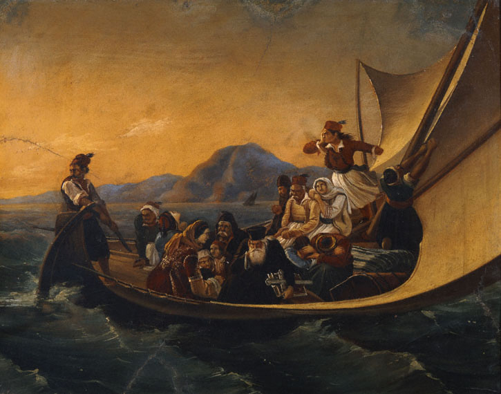 "Flucht aus Parga", Werk des griechischen Künstlers Dionysios Tsokos